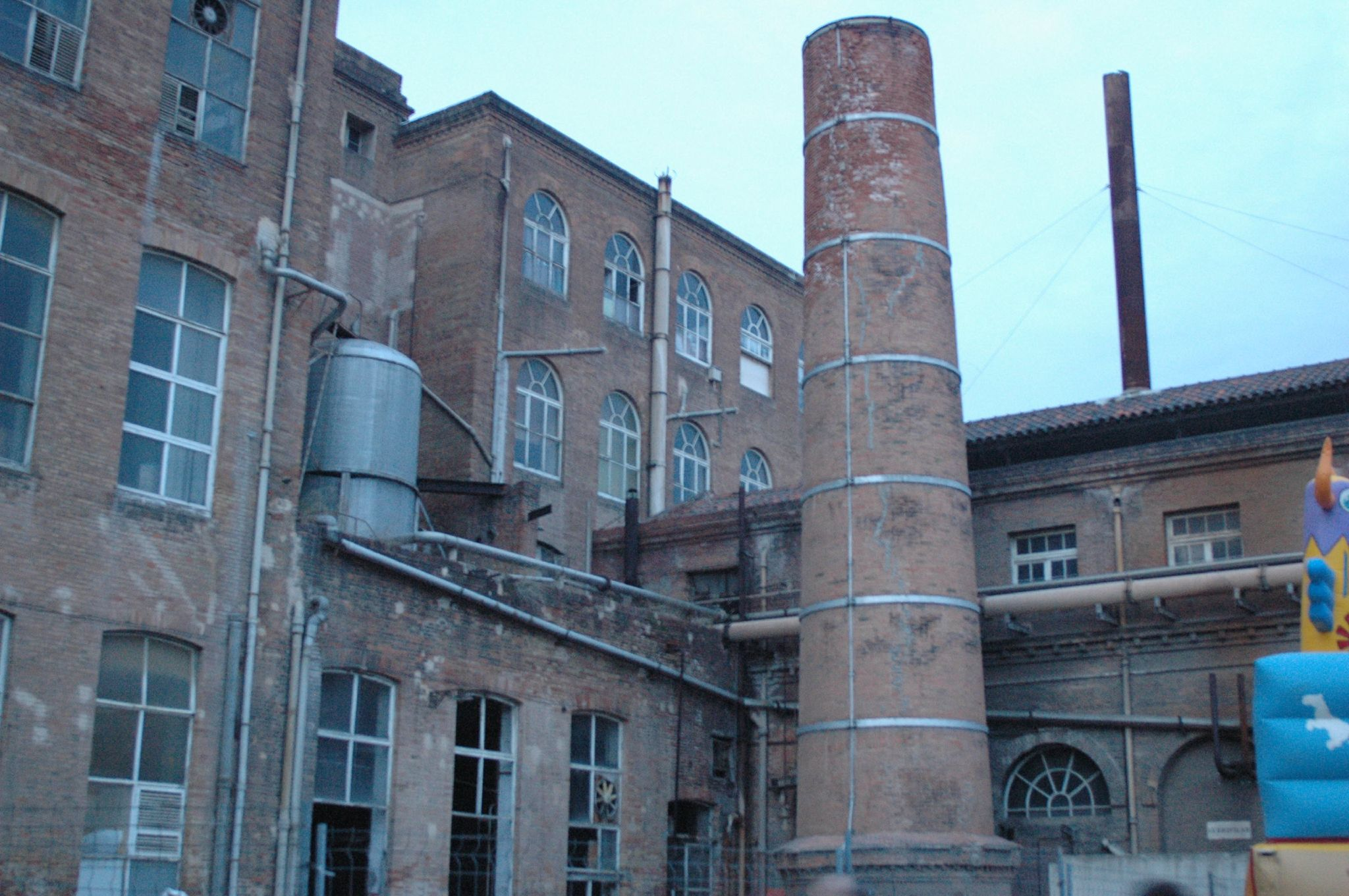 Fabra i Coats (districte de Sant Andreu). Novembre 200